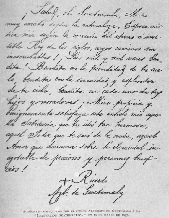 Carta escrita por el arzobispo de Guatemala Ricardo Casanova y Estrada cuando regresó a su país del destierro en abril de 1897.